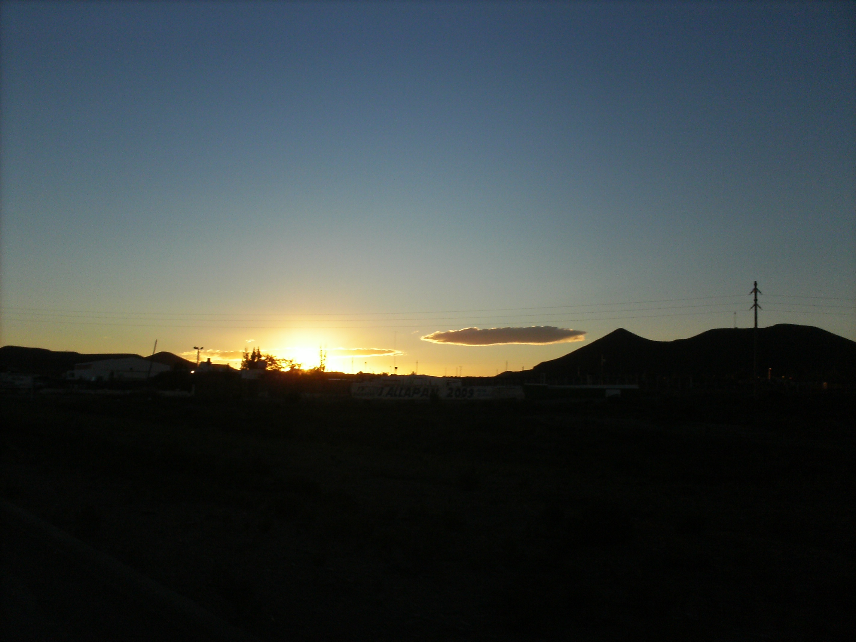 cerro tipico de la localidad